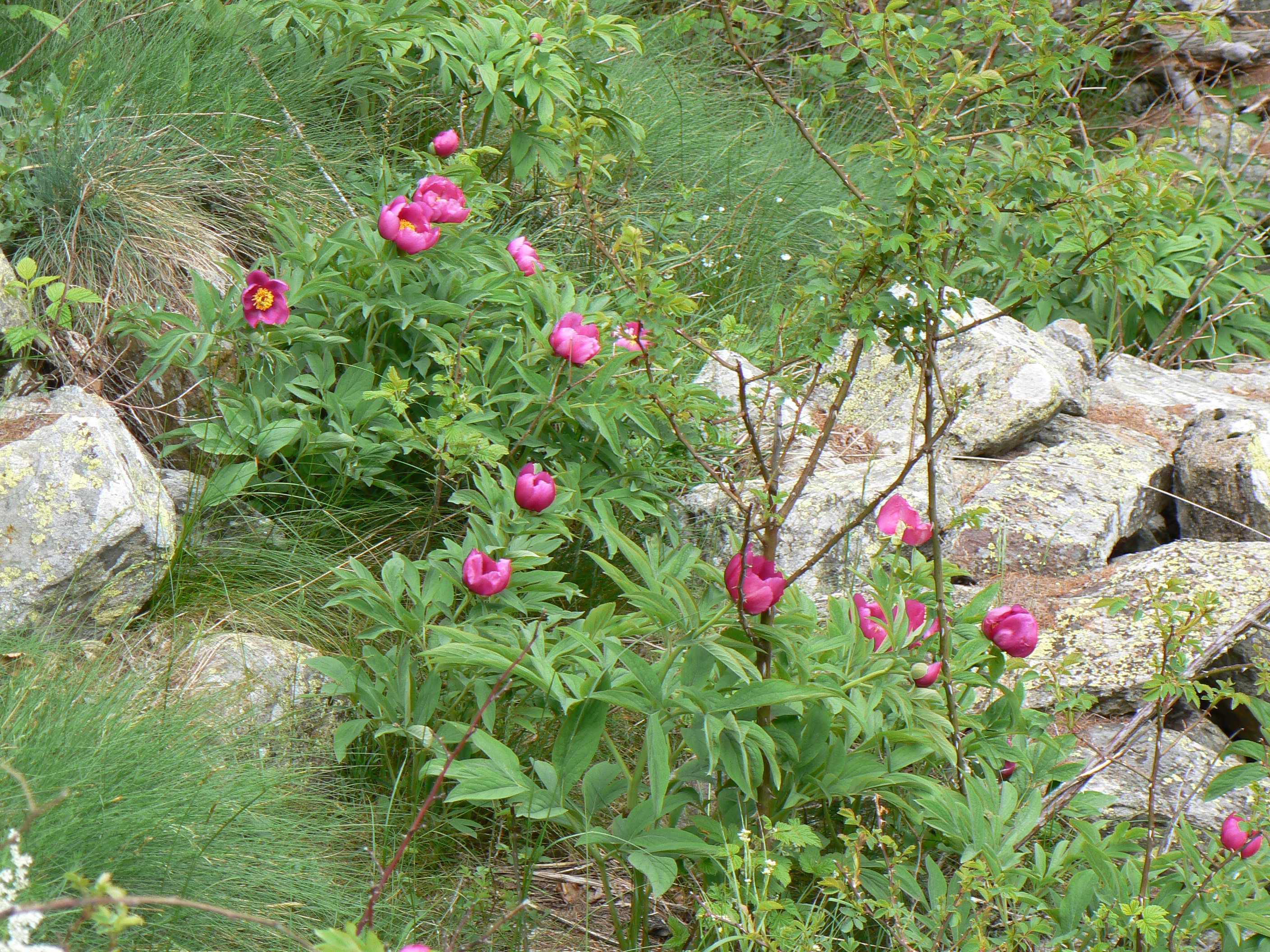 Sito di interesse comunitario Stazione di Paeonia officinalis subsp. officinalis del Col Fenêtre (SIC: IT1205110). Perloz, Valle d'Aosta, Italia.